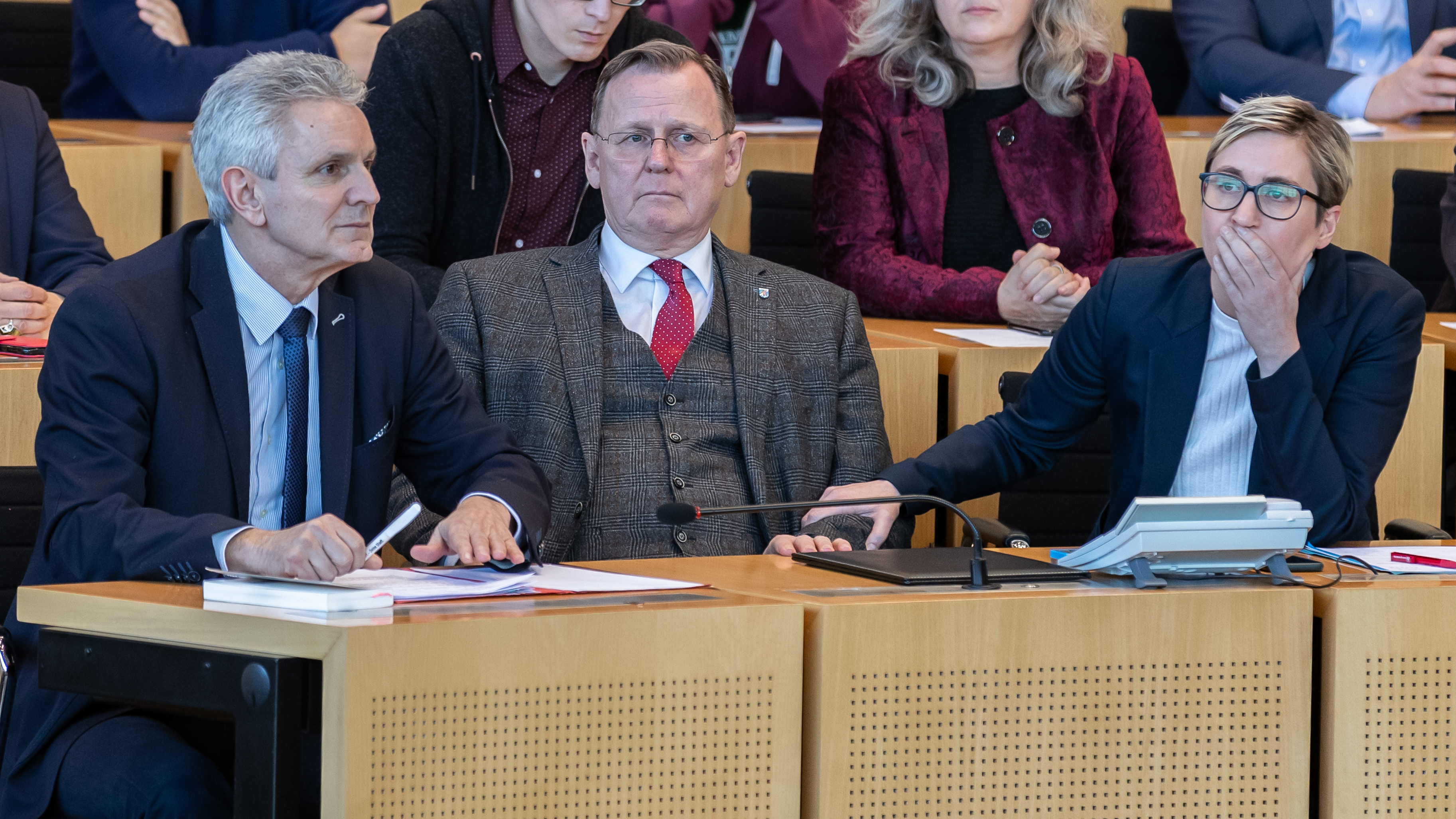 Thüringer Landtag, Wahl des Ministerpräsidenten: v.li.: Andre Blechschmidt (Die Linke, parlamentarischer Geschäftsführer in Thüringen), Bodo Ramelow (Die Linke), Susanne Hennig-Wellsow (Die Linke, Landes- und Fraktionsvorsitzende in Thüringen) bei der Verkündung des Ergebnisses des 3. Wahlgangs; Enttäuschung, enttäuscht, Frustration, disappointed